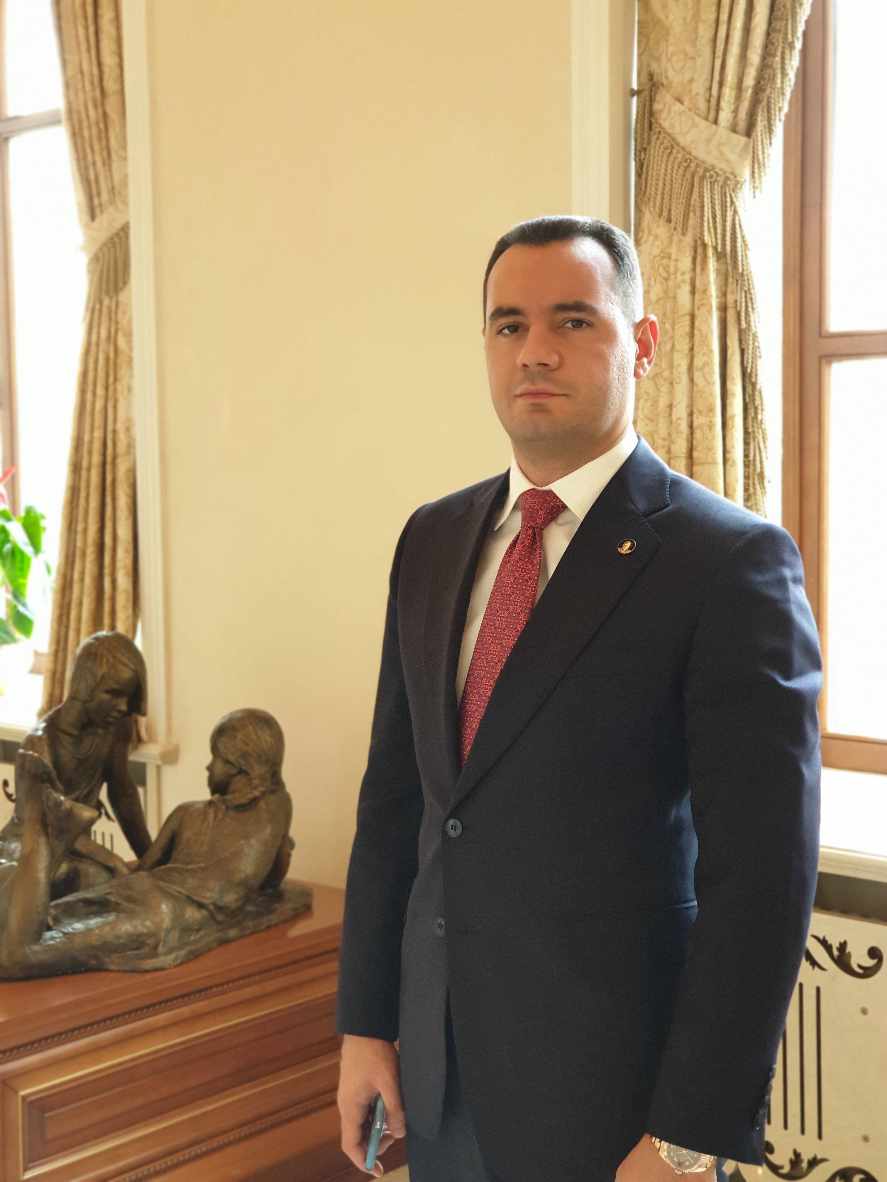 Фархад Гарашов в городе Москва.(Кутузовский проспект 2/1 стр.1, Москва, Россия - Гостиница Рэдиссон Ройал)